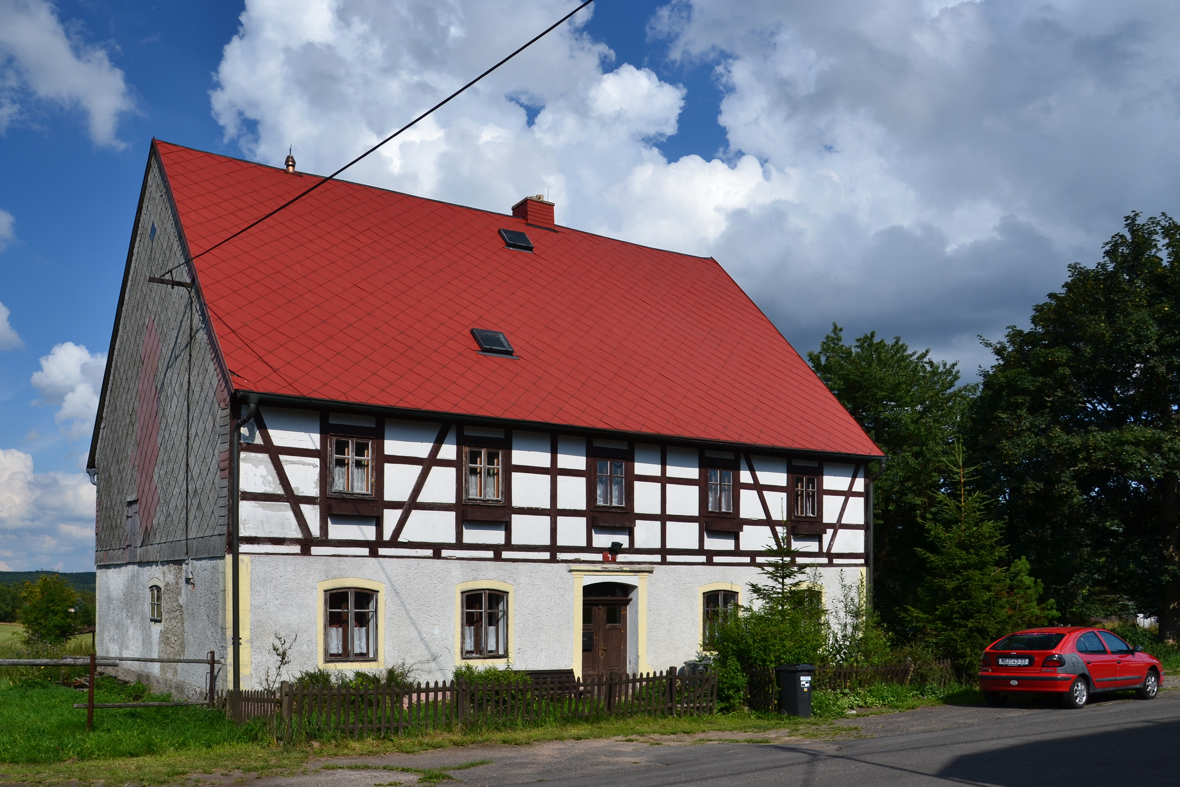 Venkovská usedlost (Načetín), Načetín 1, Načetín (Kalek).